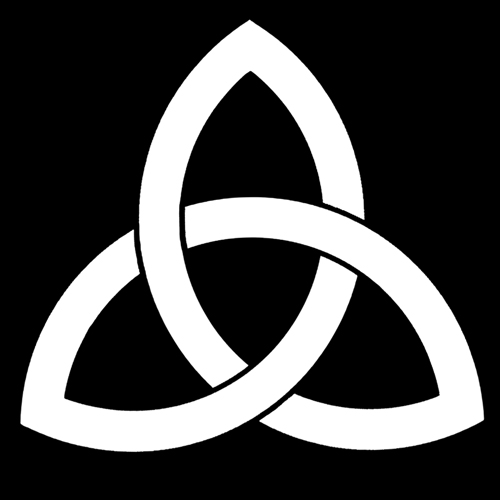 「結い柏（結び柏）」紋（染抜）